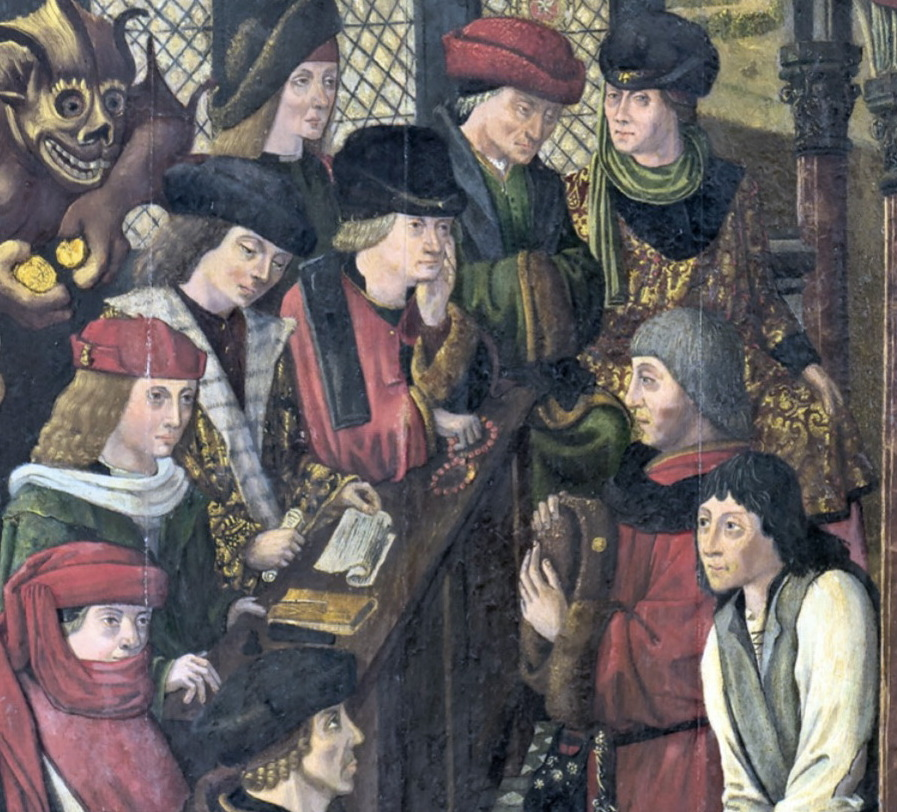 Detail van het Gerechtigheidspaneel of De dubbele gerechtigheid (Jan van Brussel, ca. 1475), voorheen in het Stadhuis van Maastricht, sinds 2018 in het Bonnefantenmuseum. Hier het linkerdeel van het onderste deel met de menselijke gerechtigheid. Afgebeeld is een laat-15e-eeuwse rechtbank met rechts een rijke en een arme aangeklaagde.